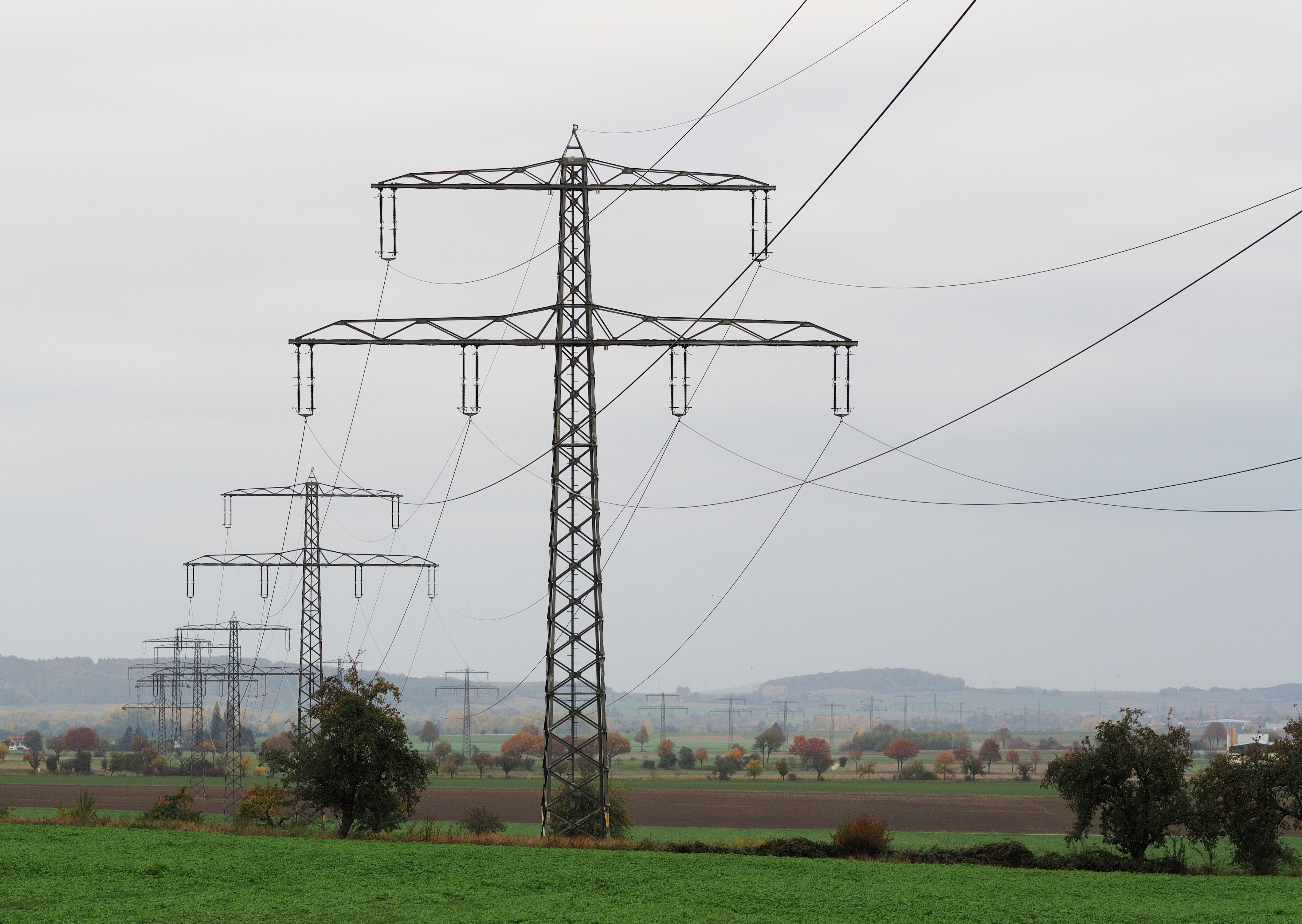 Charakteristisches Bild der 220-kV-Leitung Lehrte–Godenau–Sandershausen in Gronau (Leine)